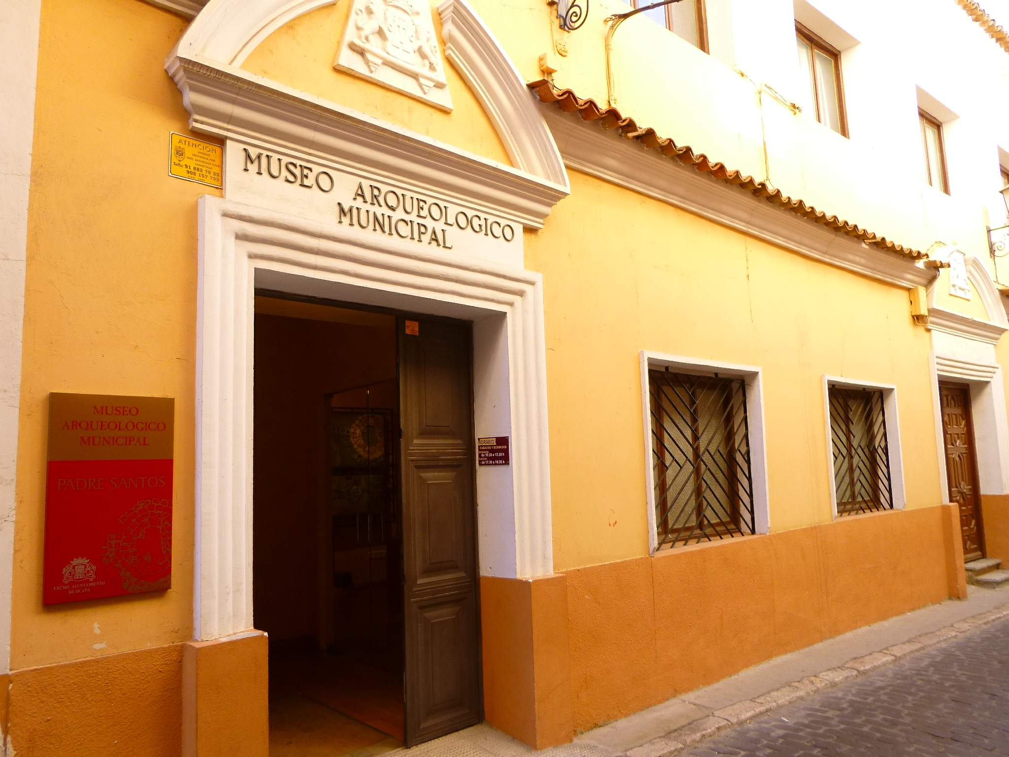 Museo Arqueológico Municipal (Convento de Santo Domingo) de Ocaña (provincia de Toledo, Castilla-La Mancha).